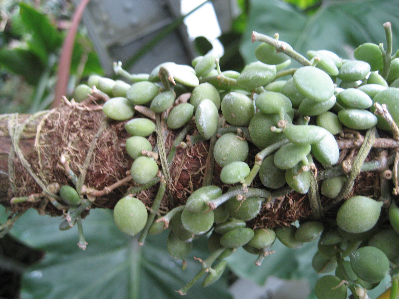 Dischidia nummularia - Habitus - Bot. Garten Berlin Dahlem